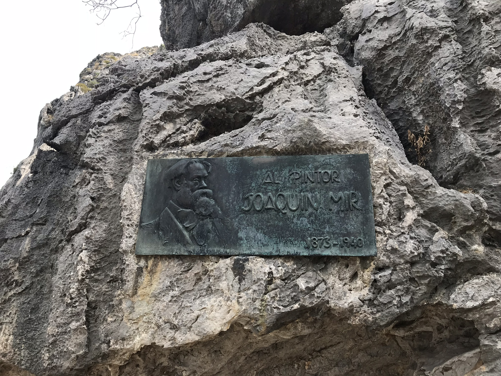 Мемориальная доска живописцу Жоакиму Миру (1873–1940) близ ущелья Торрент-де-Паррейс, Са-Калобра, Майорка